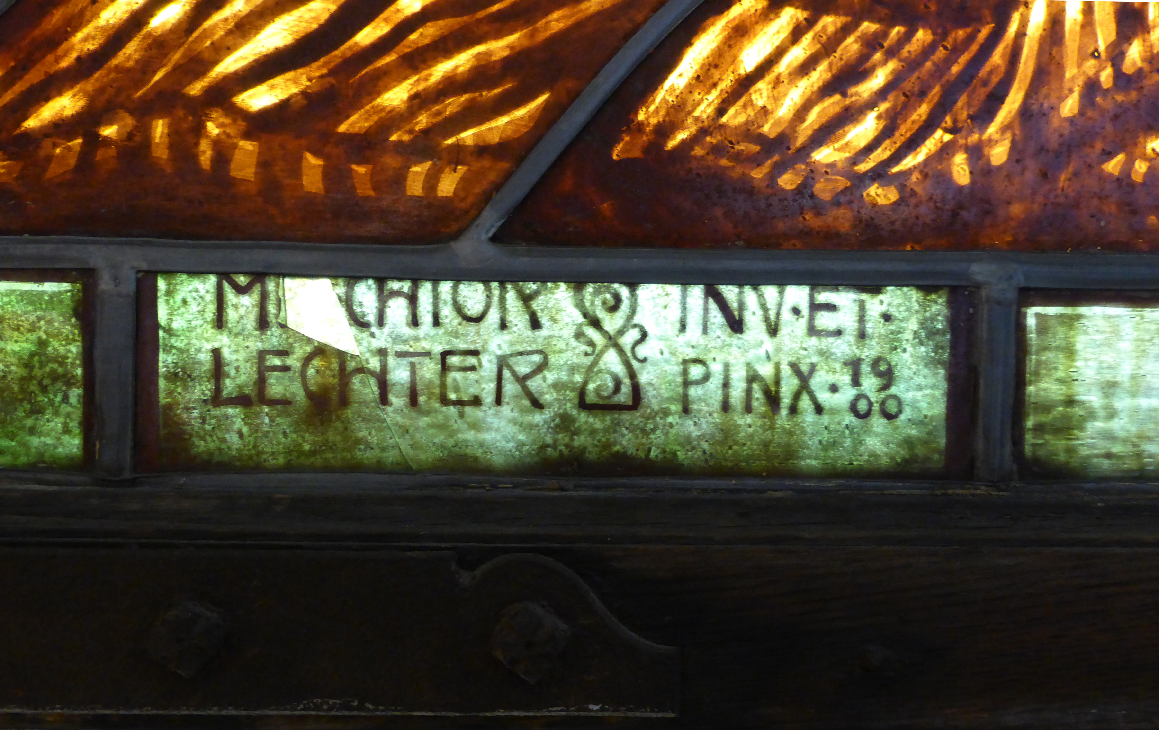 Linker Flügel des "Pallenberg-Fensters" von Jakob Pallenberg für den "Pallenberg-Saal" des Kunstgewerbemuseums gestiftet. Ausführung Melchior Lechter 1896-1900. Ausgestellt im Museum für Angewandte Kunst Köln.